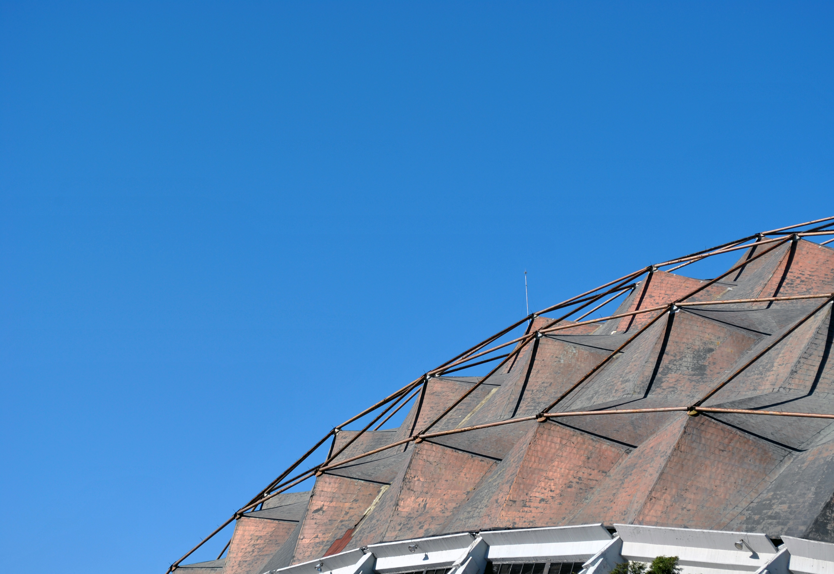 Detalle del Palacio de los Deportes de la Ciudad de México.